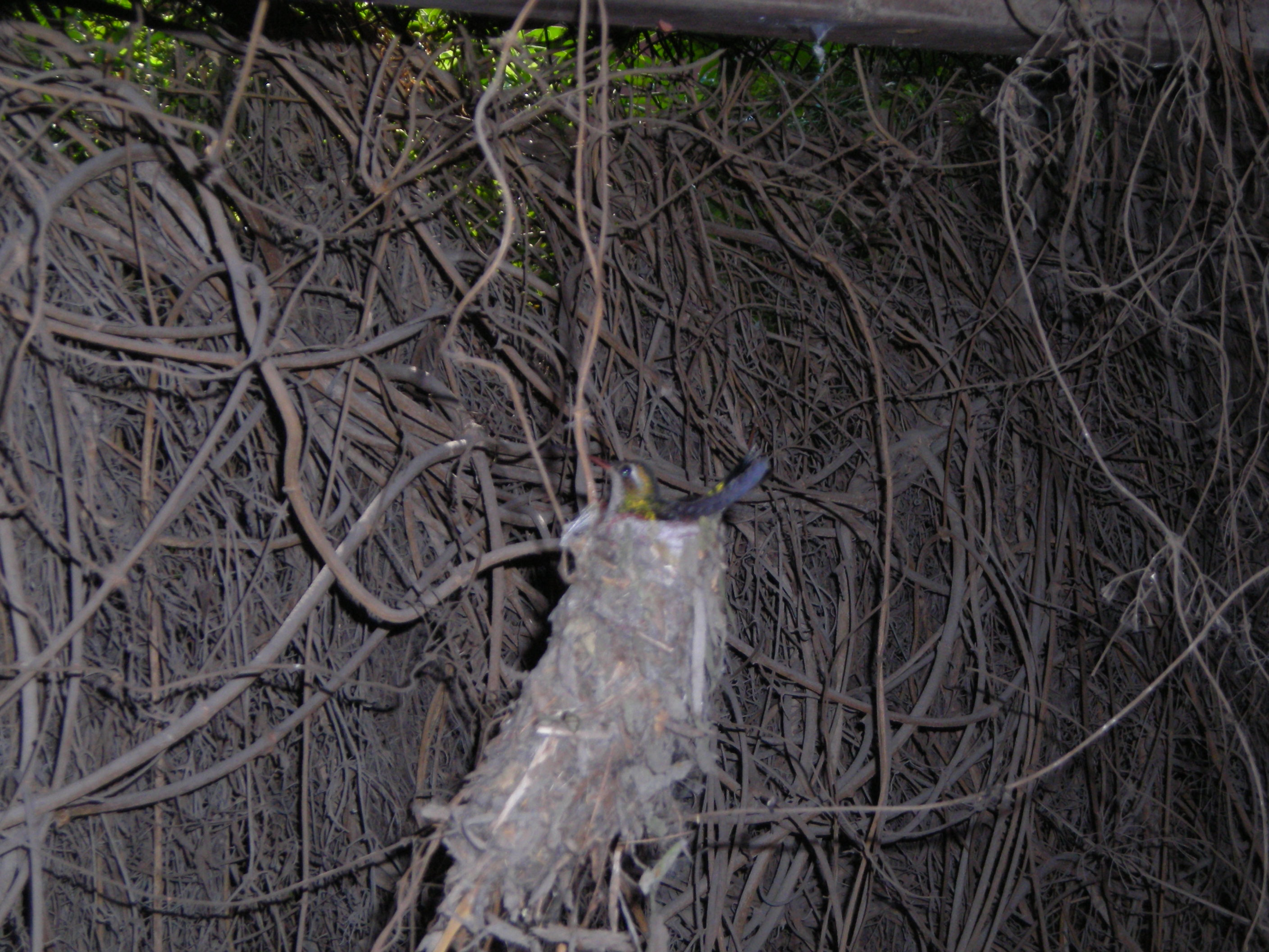 Colibrí (Chlorostilbon lucidus) empollando en su nido